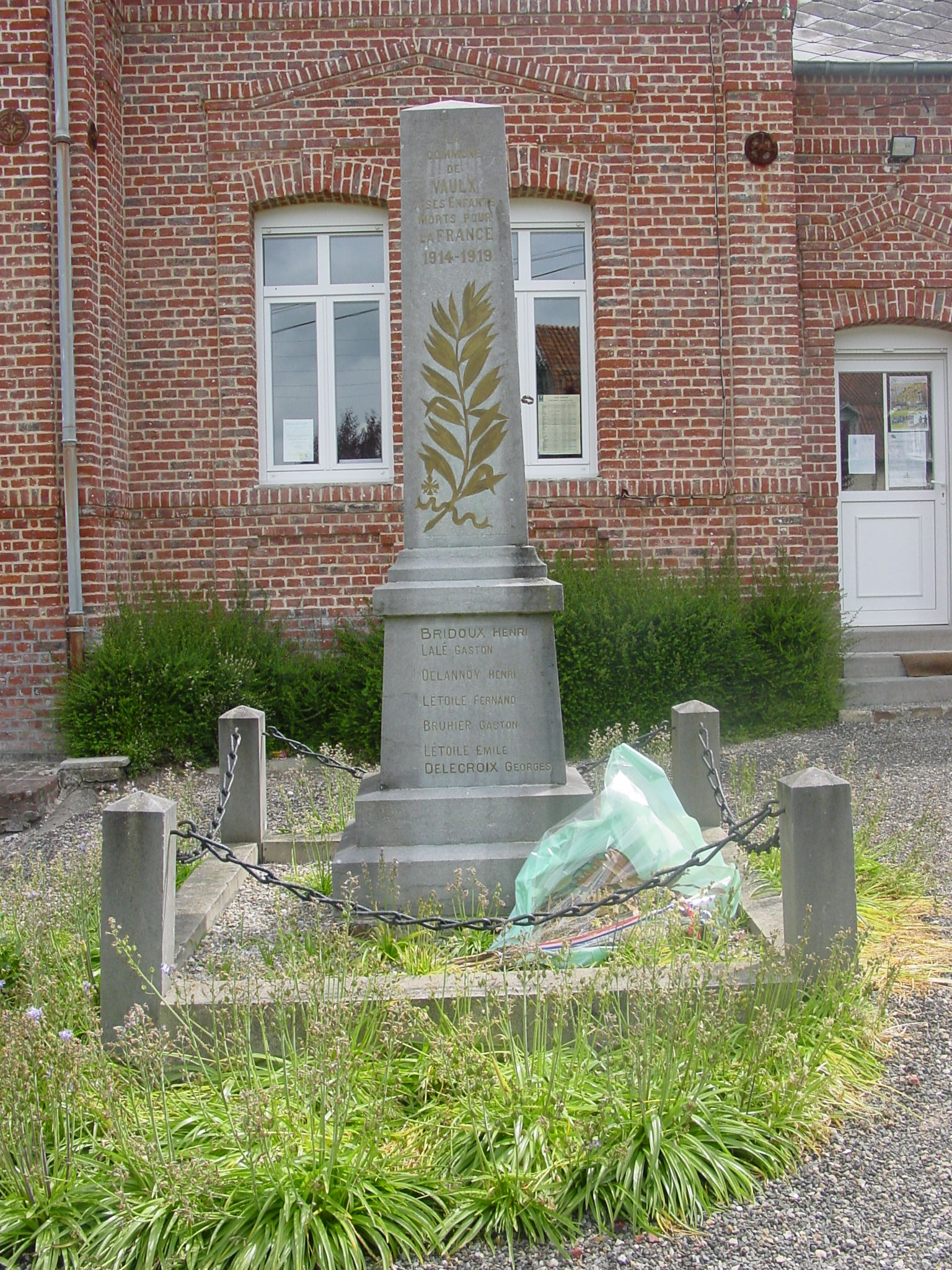 Monument aux morts de Vaulx (62).